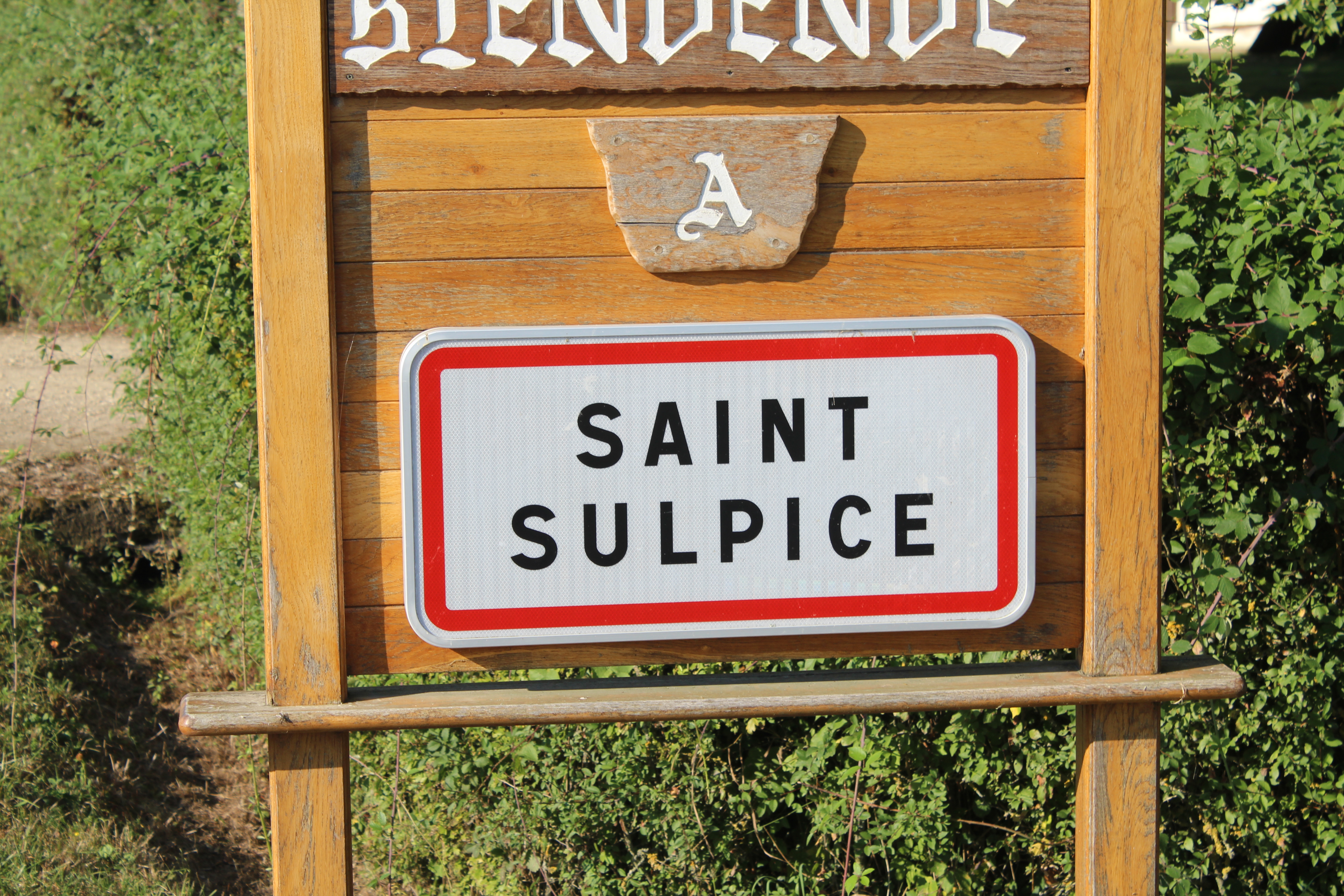 Panneau d'entrée dans Saint-Sulpice depuis la poype.